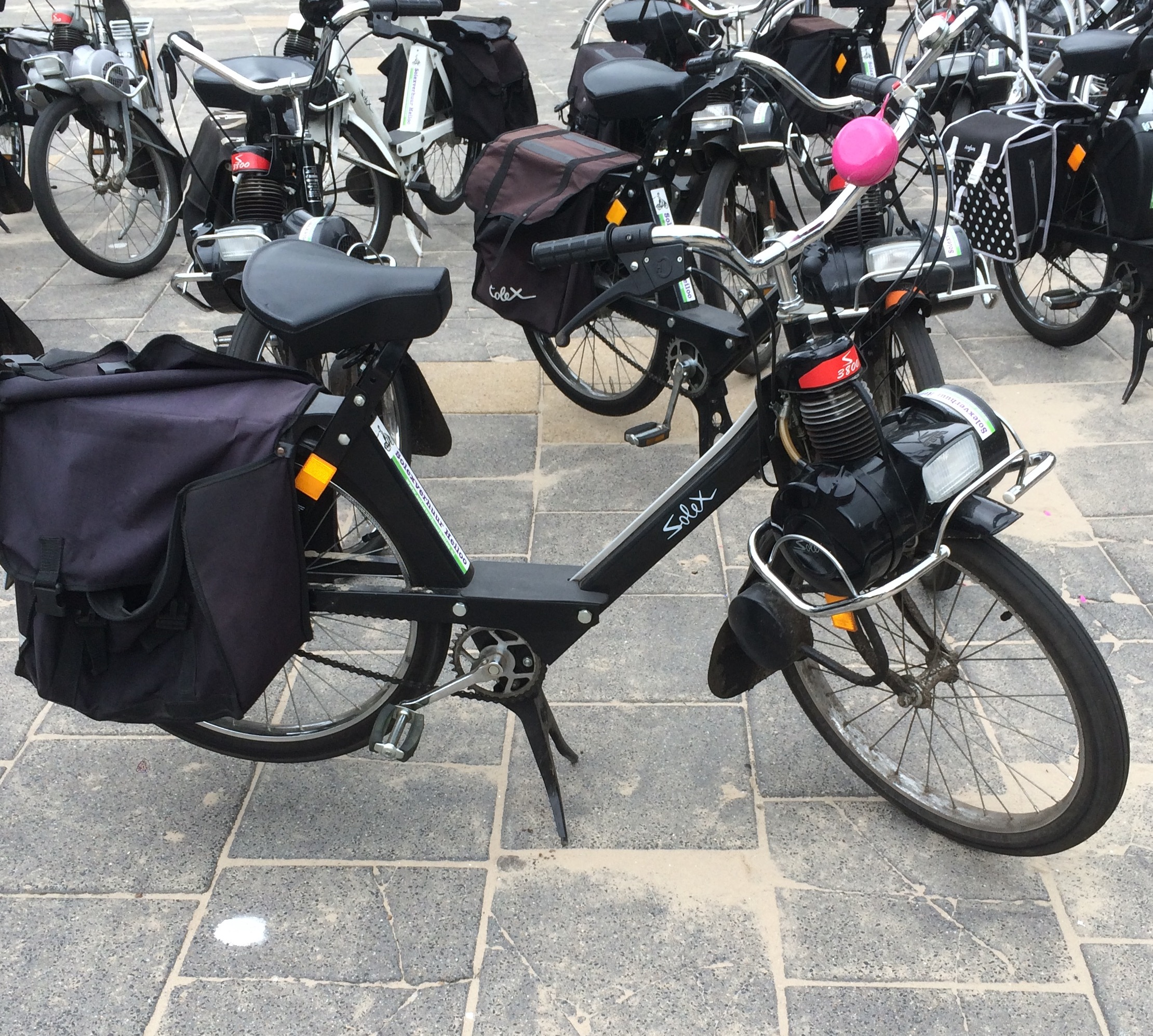 Solex